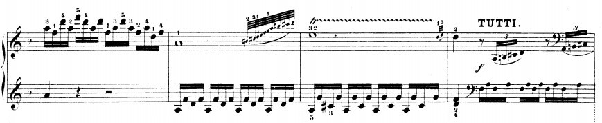 莫扎特的第20號鋼琴協奏曲第1樂章，第353-356小節鋼琴部份，當中的顫音是以旋律小二度關係的E音和F音互相交替而成的。